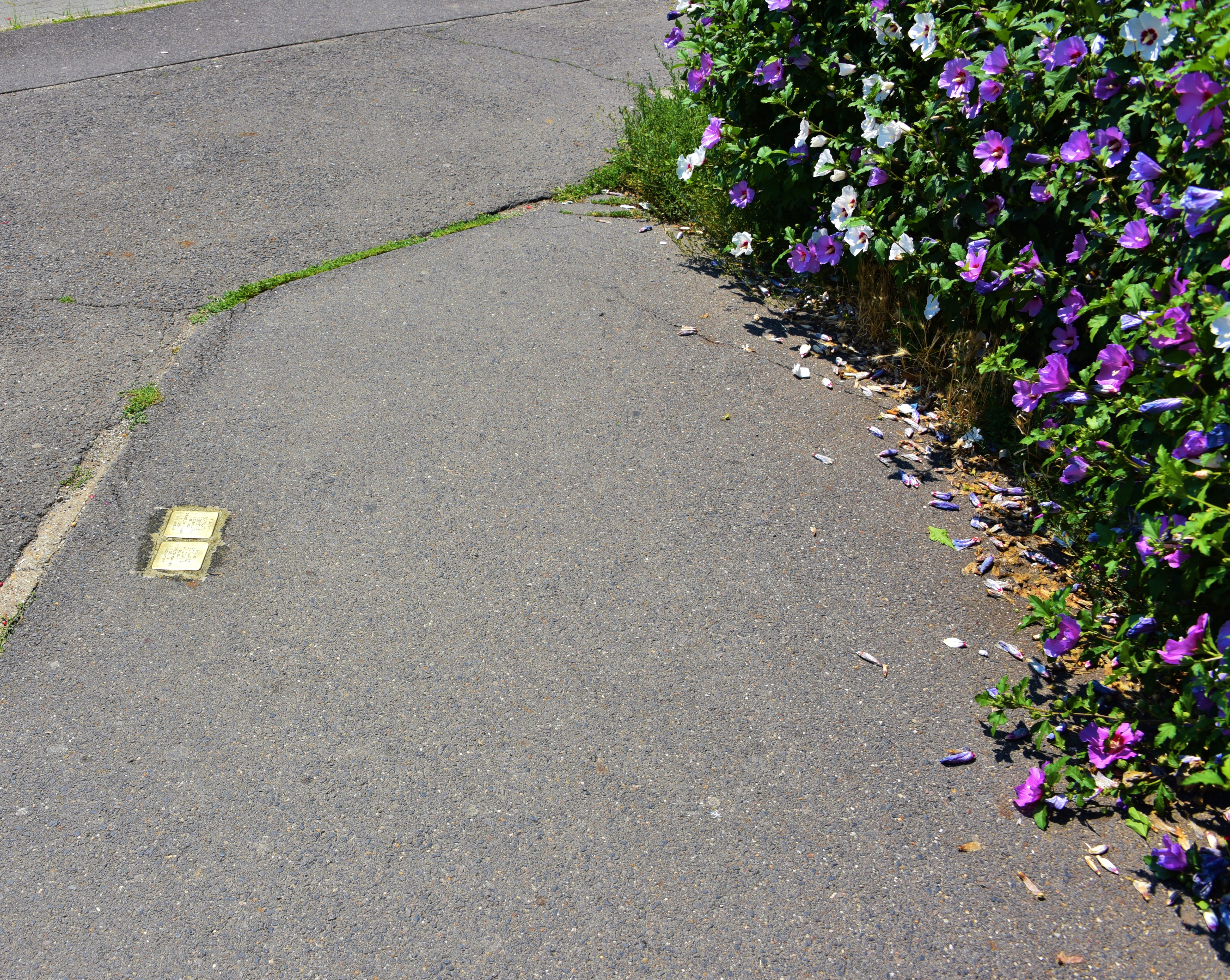 Stolpersteine in Miskolc